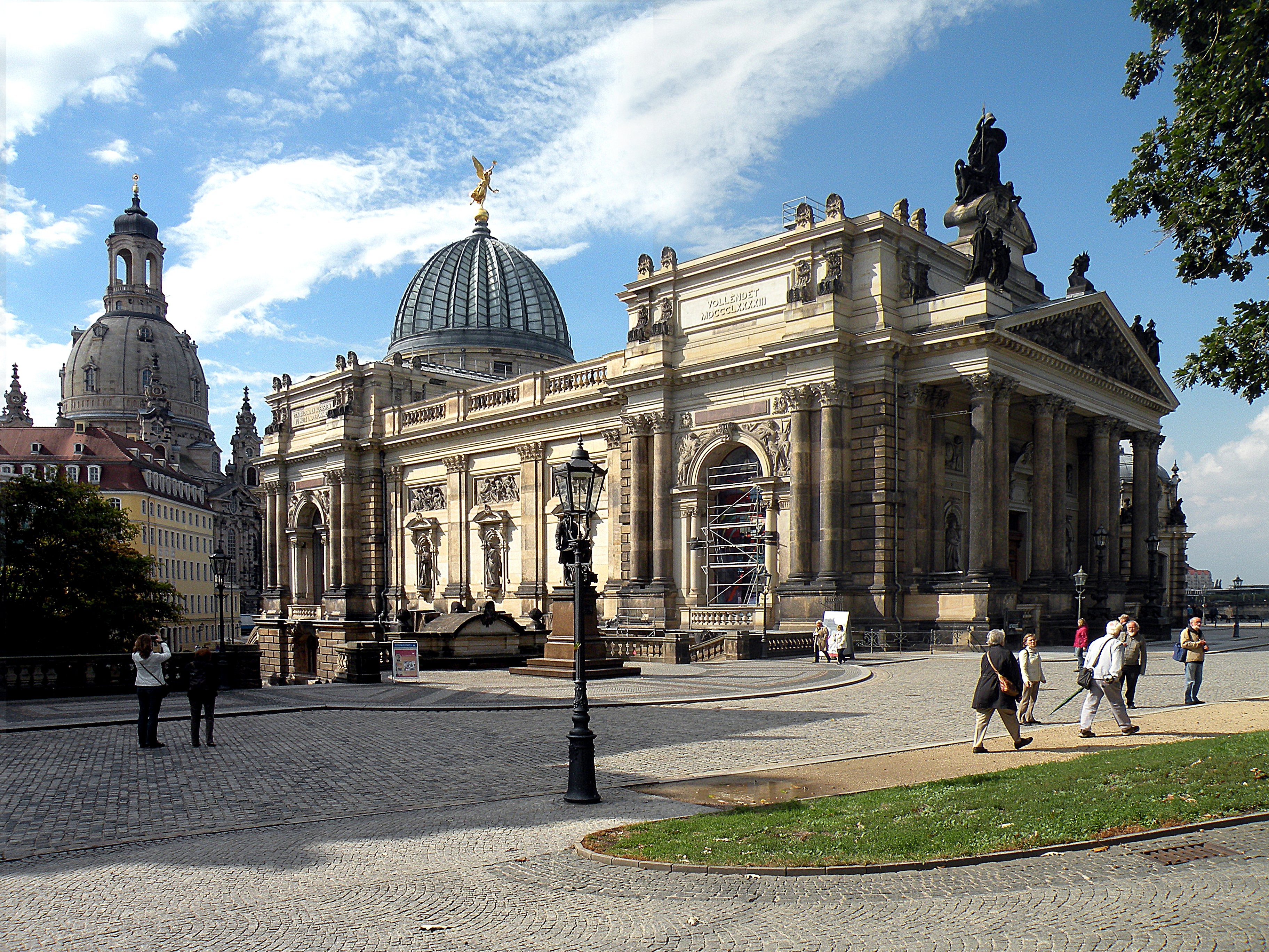 Akademie._(Dresden}._